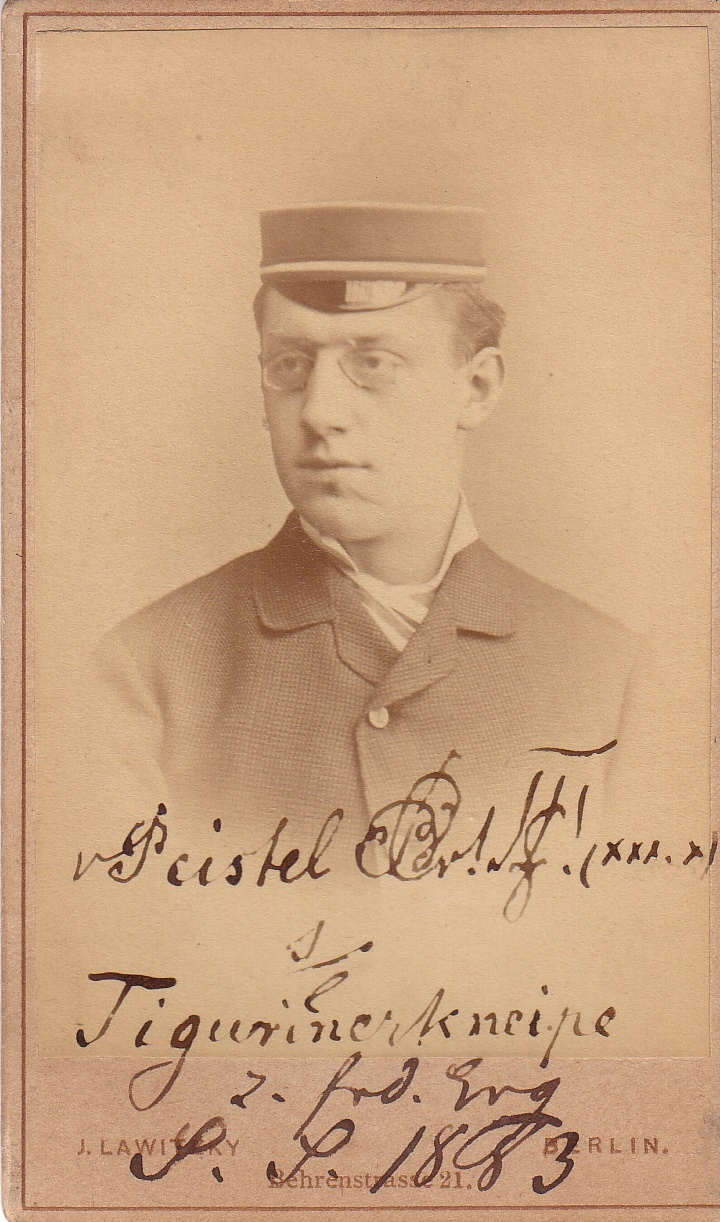 Porträtfotografie von Carl von Peistel (1862–1930)